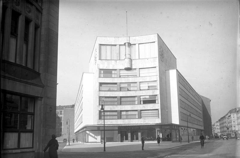 Das neue Verwaltungsgebäude des Metallarbeiter-Verbandes, welcher augenblicklich den Streik der Metallarbeiter führt.